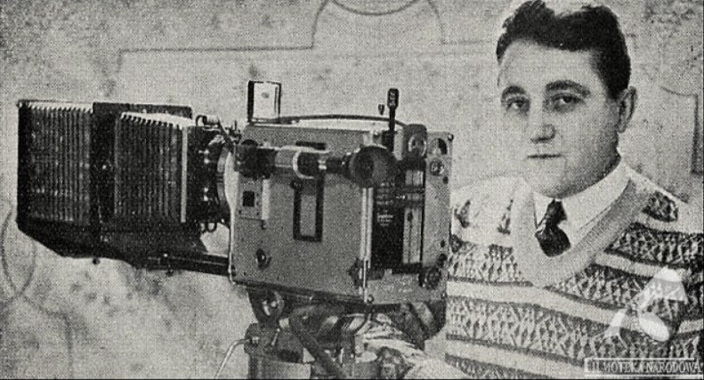 Antoni Wawrzyniak